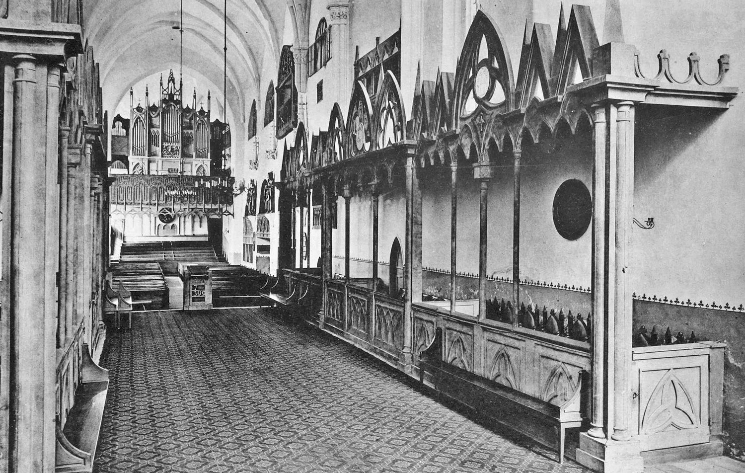 Die neogotische Ausstattung des Domes St. Marien zu Wurzen um 1900